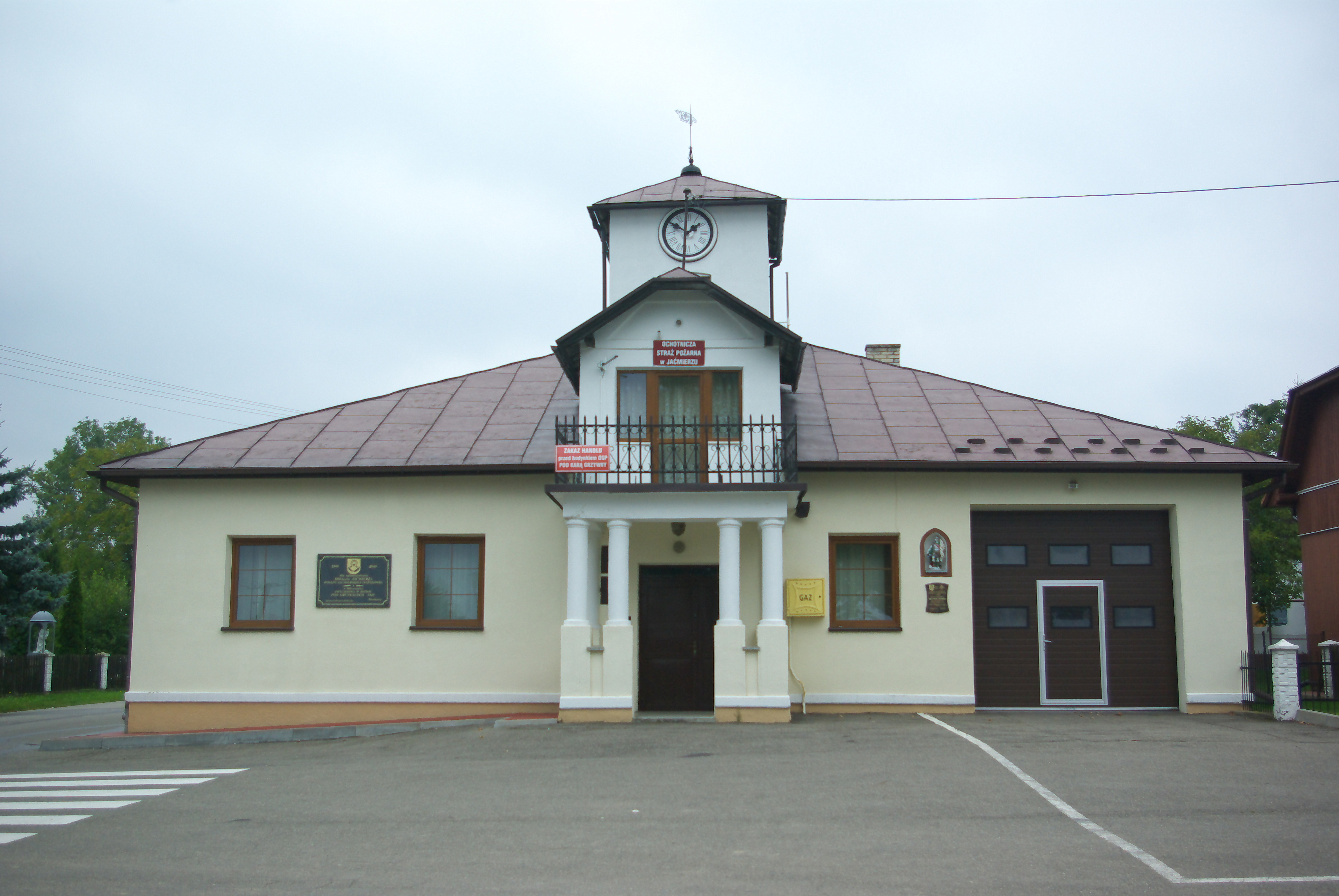 Budynek starego ratusza w Jaćmierzu, obecnie Ochotnicza Straż Pożarna